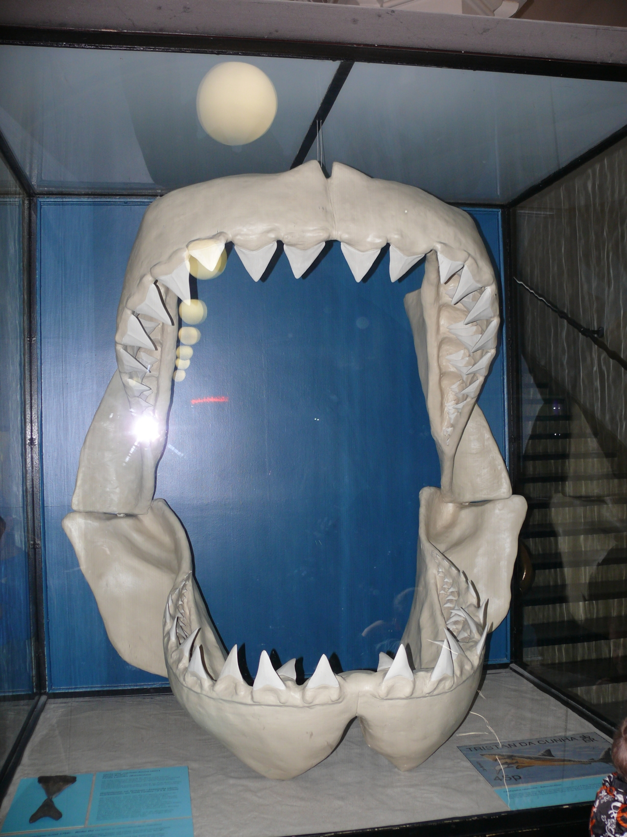 Carcharodon megalodon, jaw